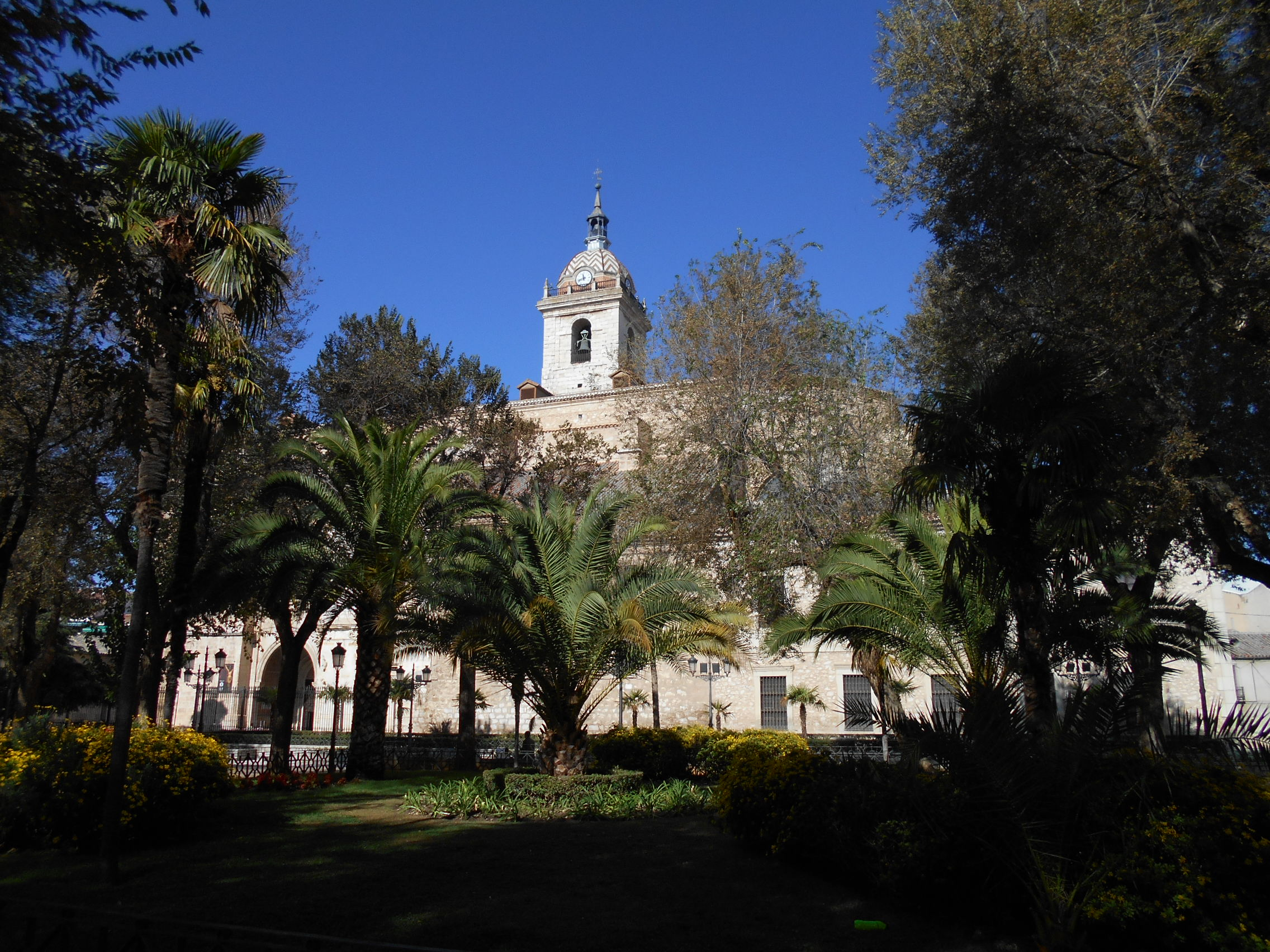 Jardines municipales